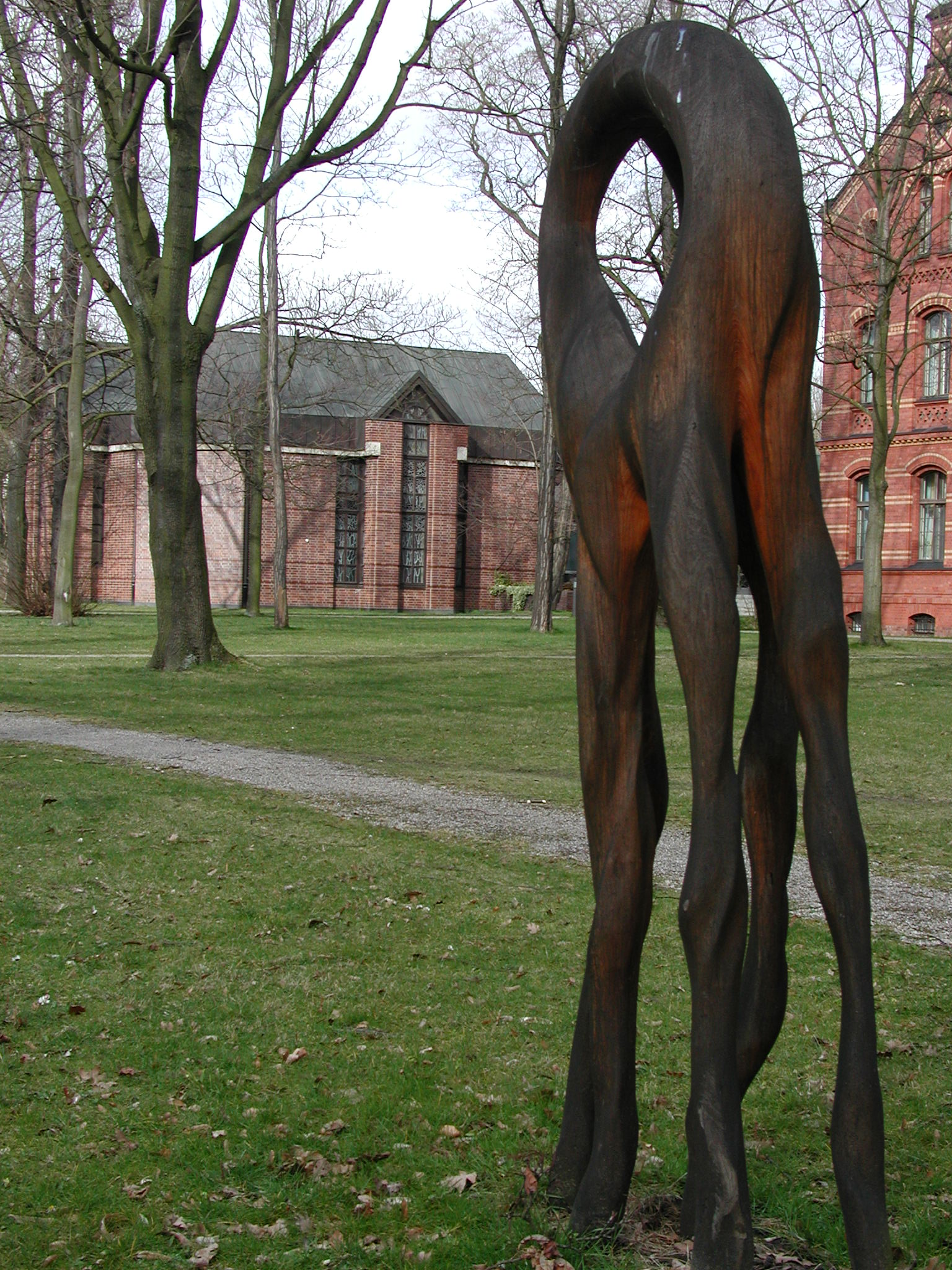 Holzkunst im KEH